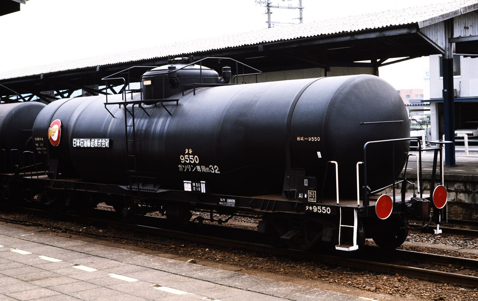 美濃太田駅の日本貨物鉄道私有貨車タキ9550形式タキ9550(日本石油輸送所有)